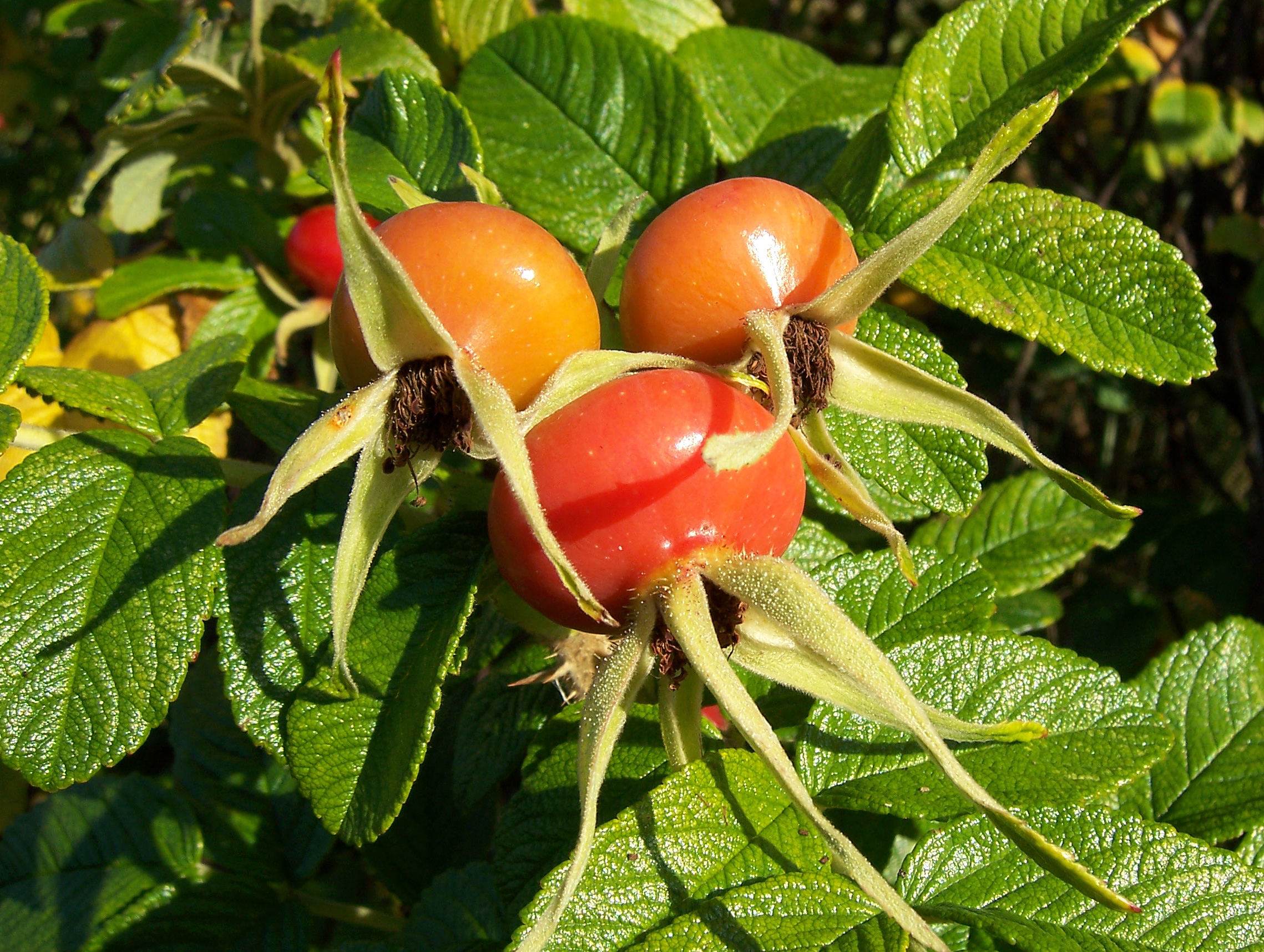 Nordseeinsel Spiekeroog. Kartoffelrose (rosa rugosa)